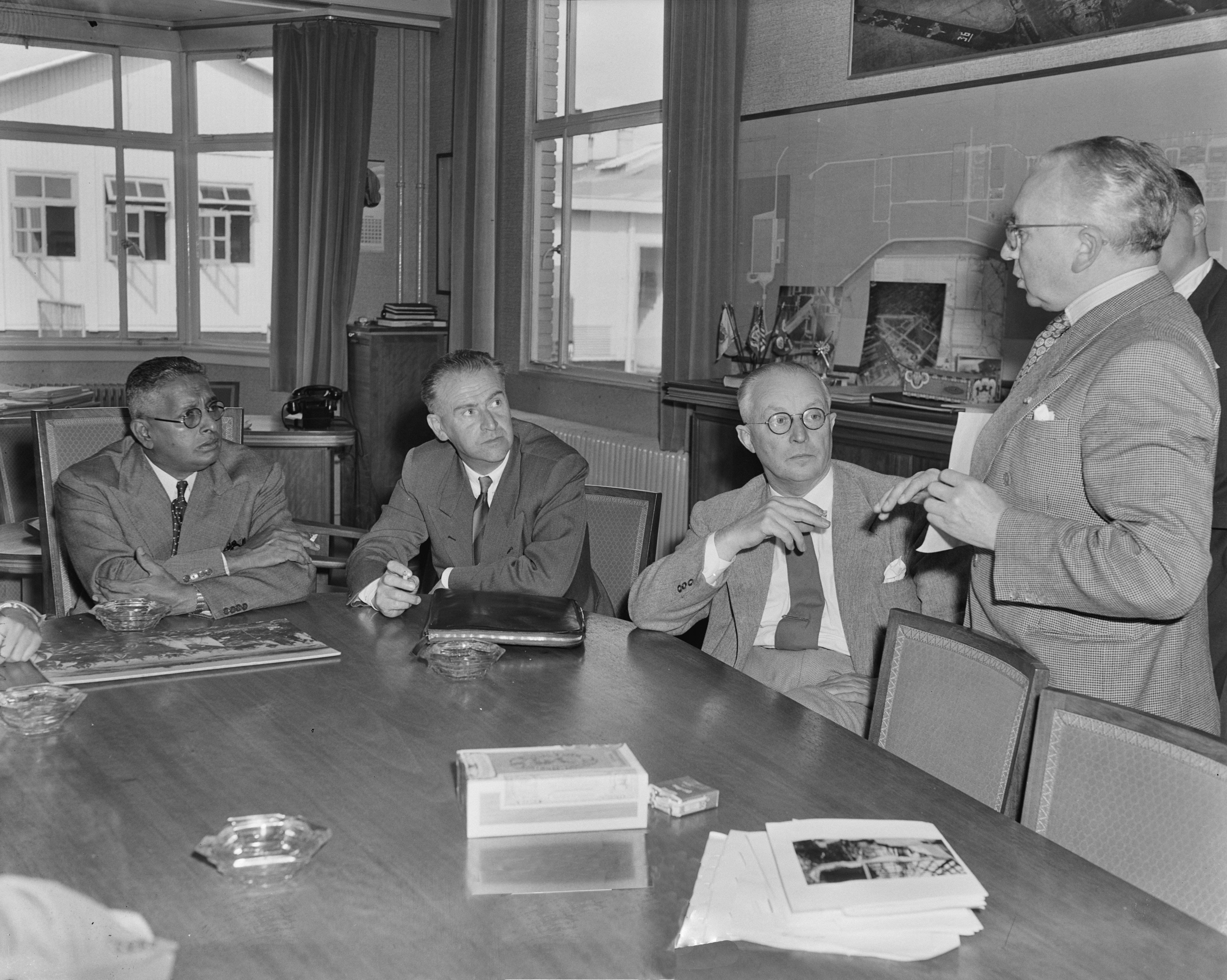 Collectie / Archief : Fotocollectie Anefo Reportage / Serie : [ onbekend ] Beschrijving : Sir Kotalawala, Minister van Verkeer (Ceylon) op Schiphol Datum : 8 september 1951 Locatie : Noord-Holland, Schiphol Trefwoorden : ministers Fotograaf : Pot, Harry / Anefo Auteursrechthebbende : Nationaal Archief Materiaalsoort : Negatief (zwart/wit) Nummer archiefinventaris : bekijk toegang 2.24.01.04 Bestanddeelnummer : 904-7544